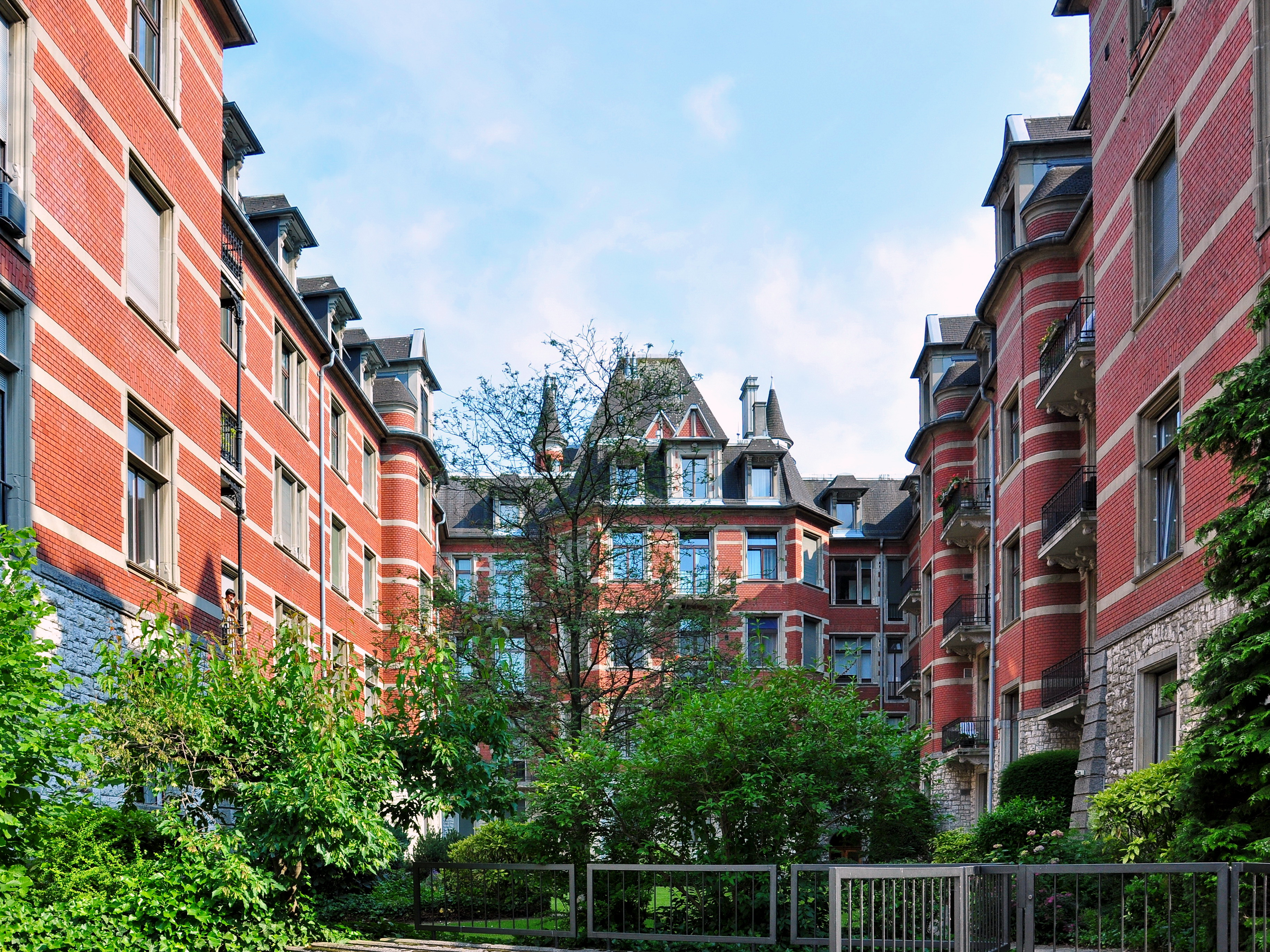 Rotes Schloss (Red Castle) in Zürich-Enge (Switzerland)